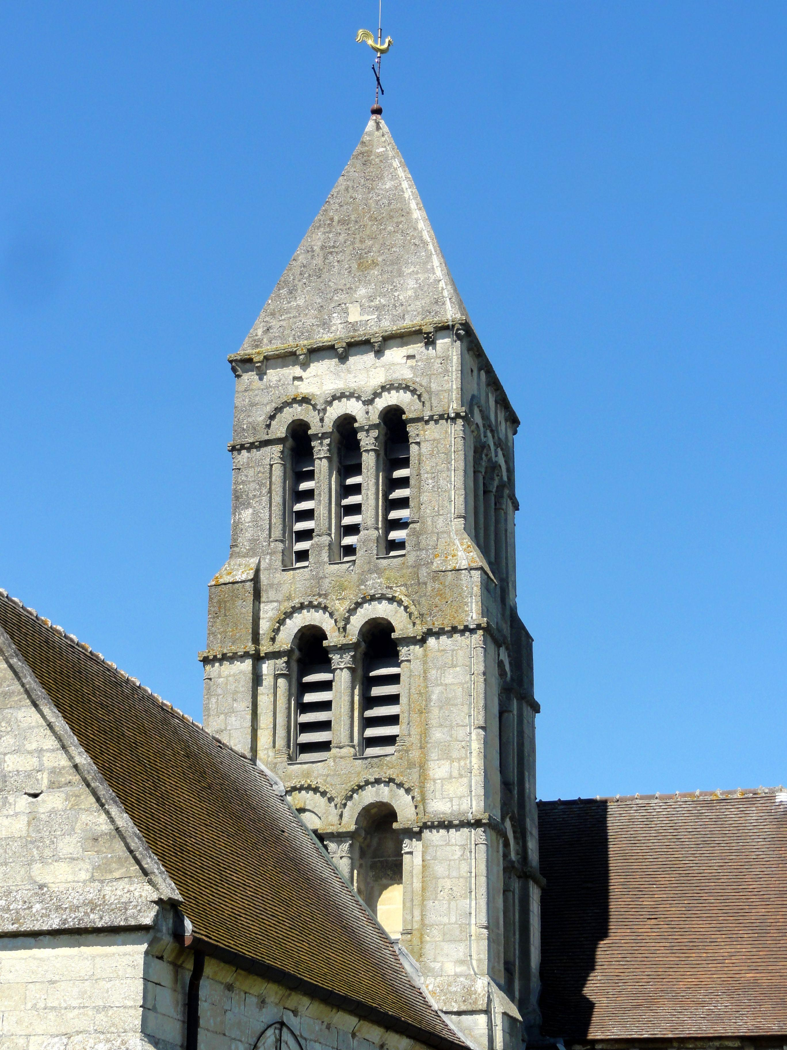 Clocher.